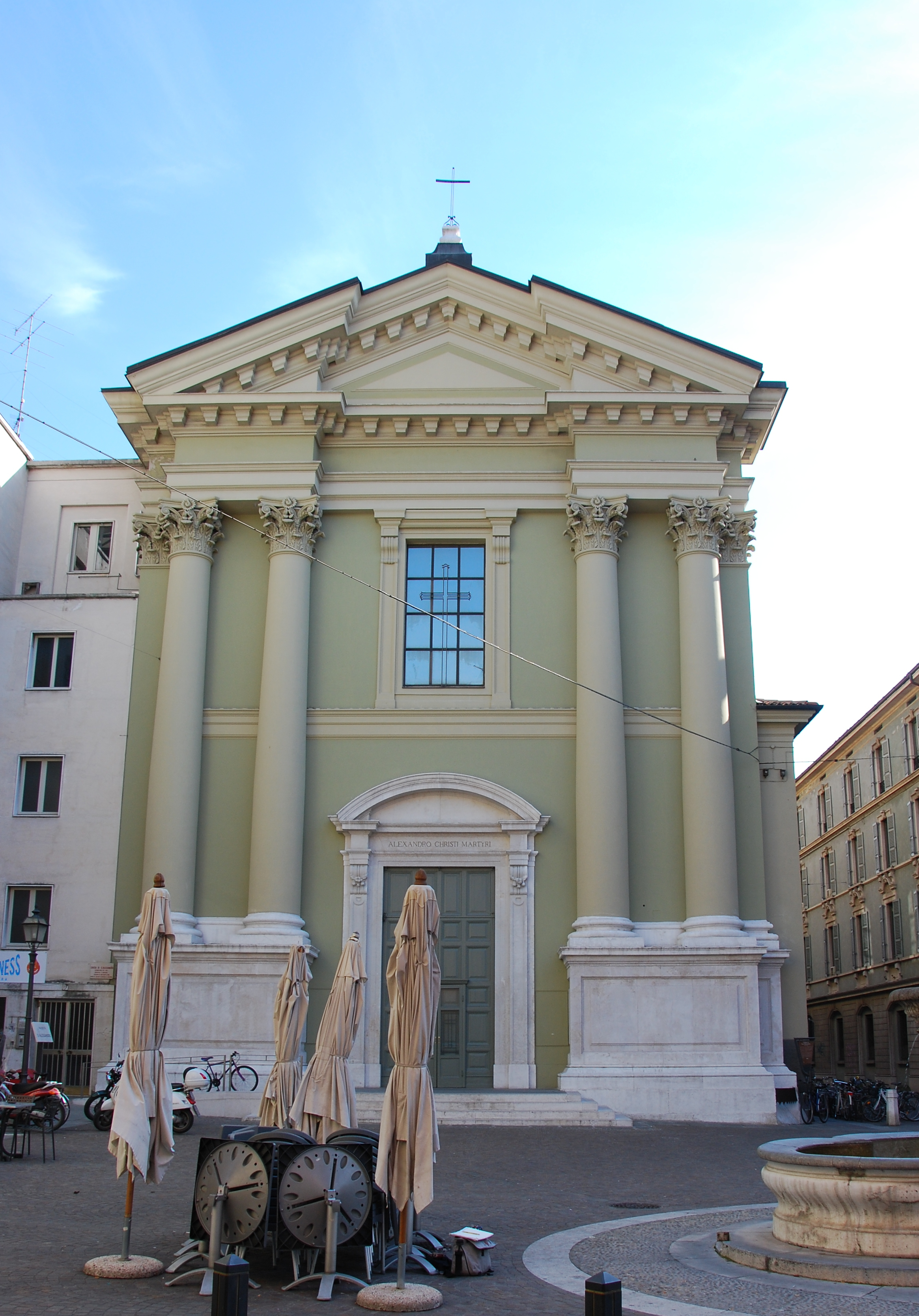 sant'alessandro (brescia) facciata2.jpg